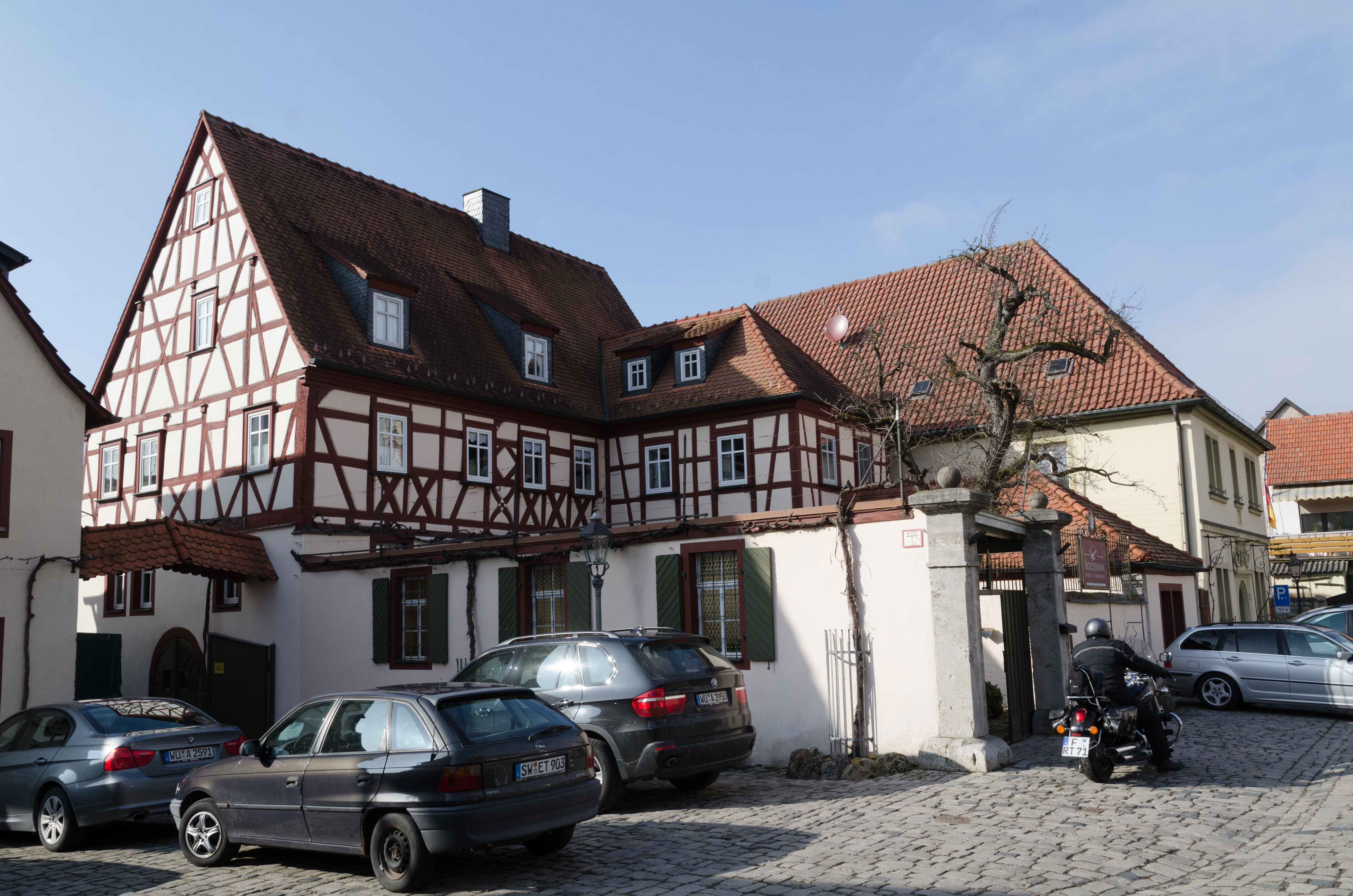 Sommerhausen, Plan 4